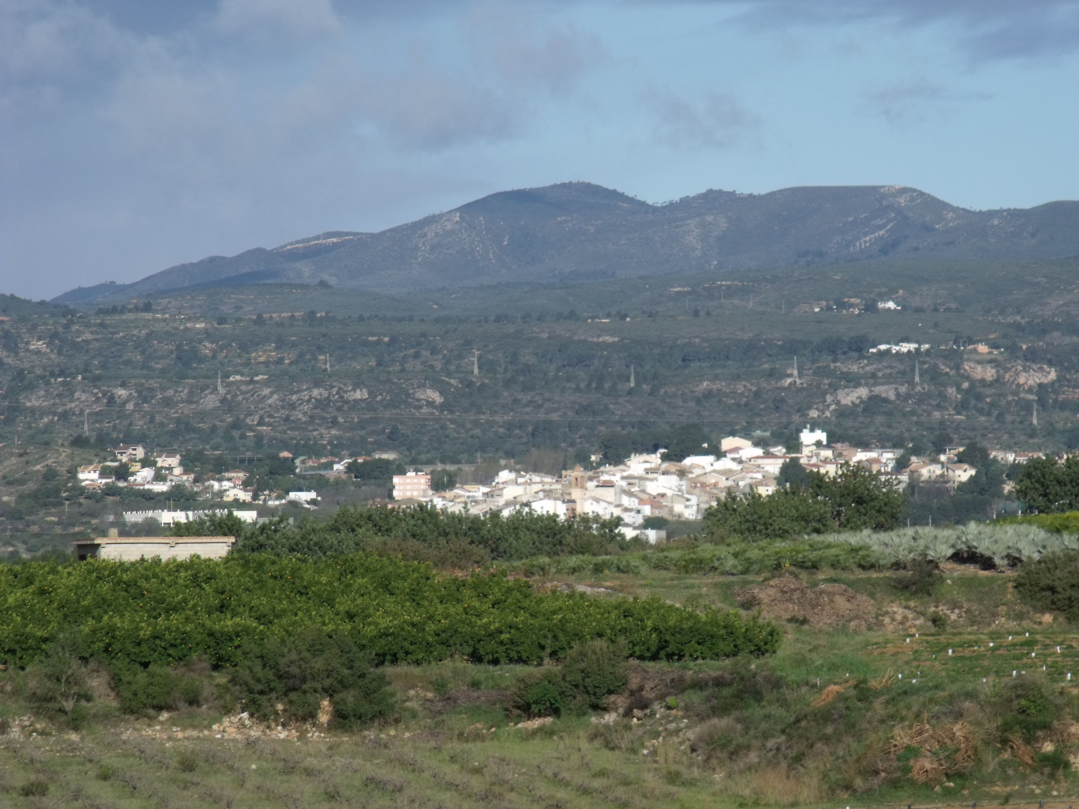 Alborache visto desde el Castillo de Turís.